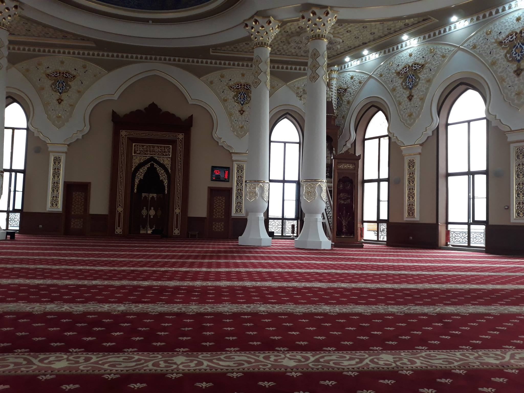 Мечеть в с. Беной